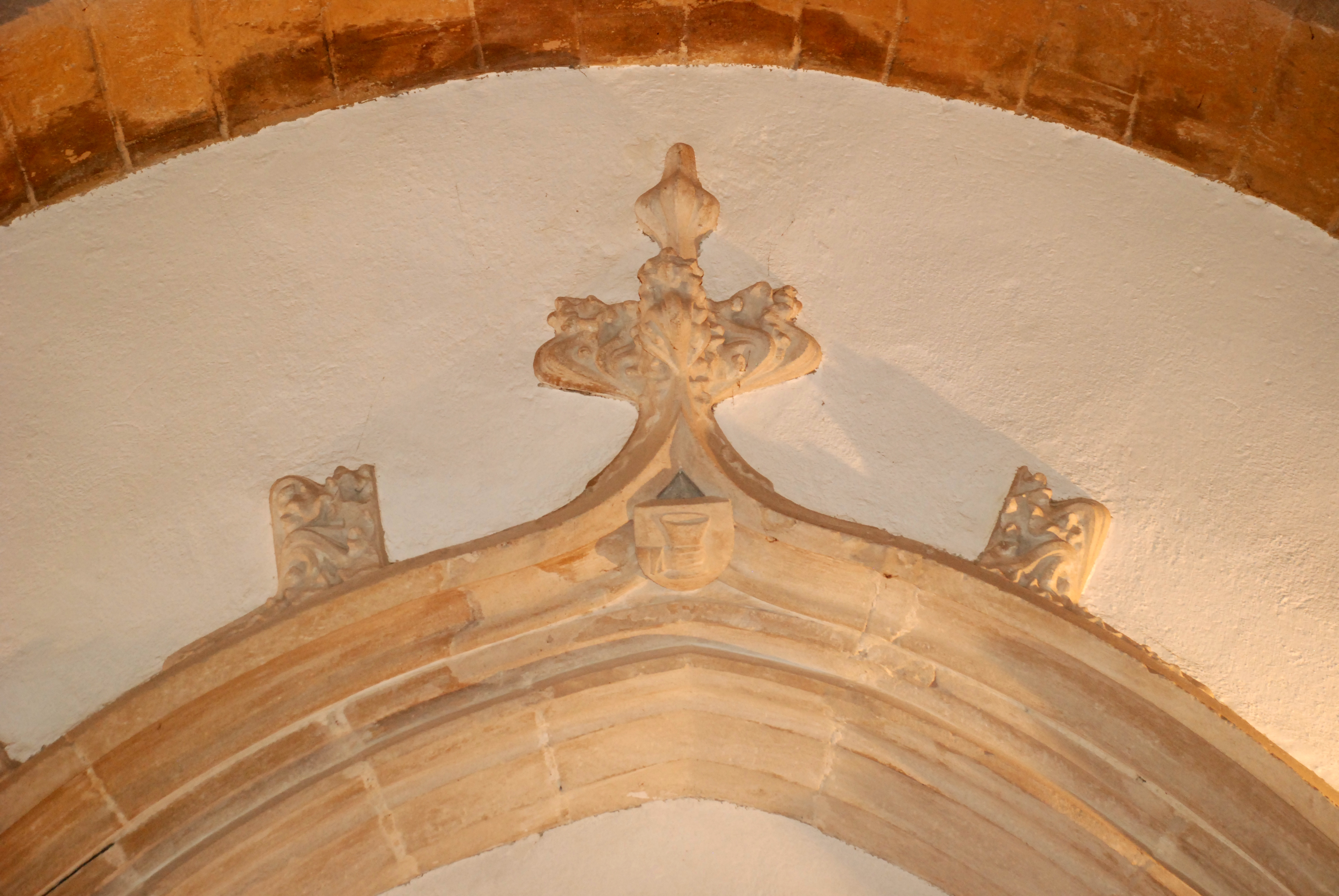 France - Bourgogne - Saône-et-Loire - Tournus - église Saint-Valérien .